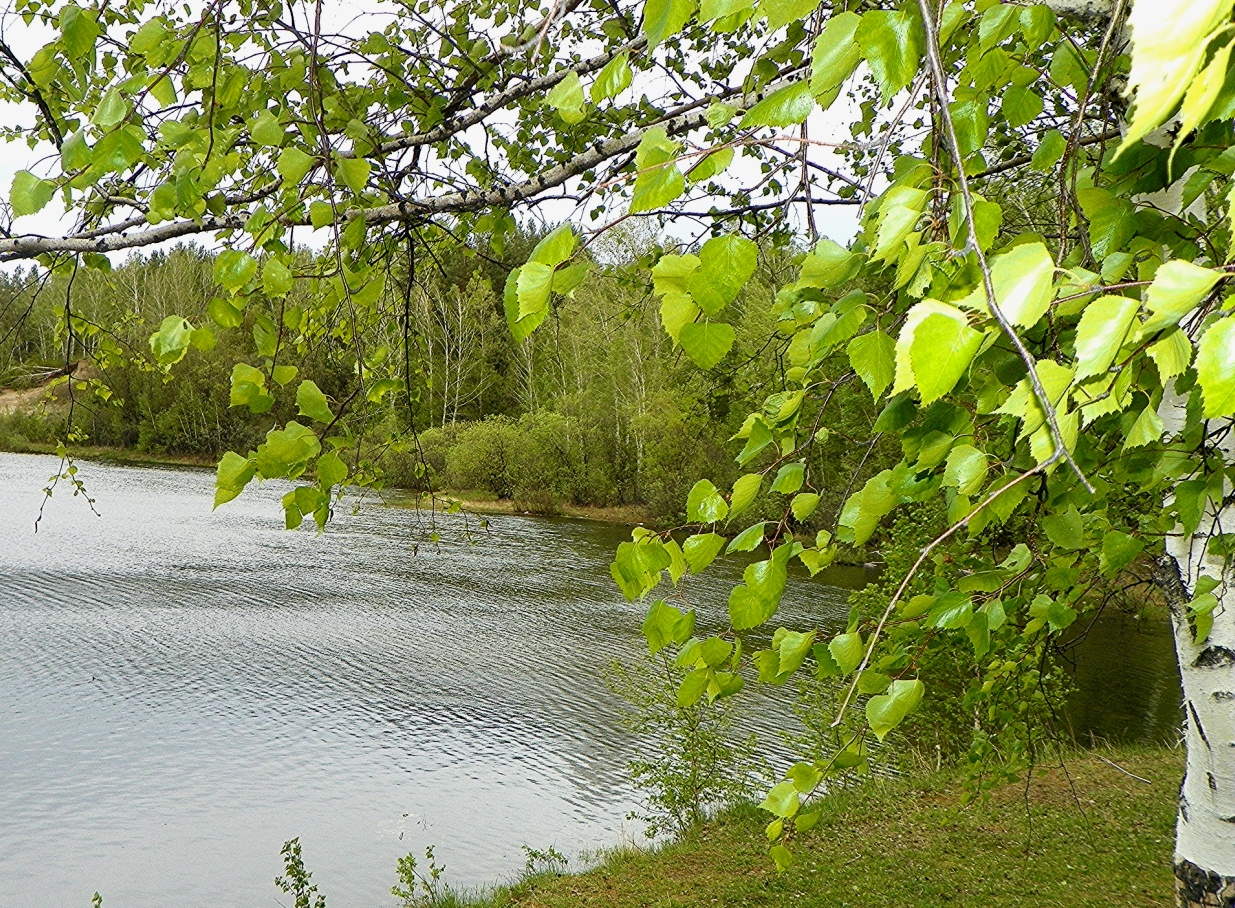 Перовское лесничество имеет немало больших и маленьких озер, называемых карьерами.